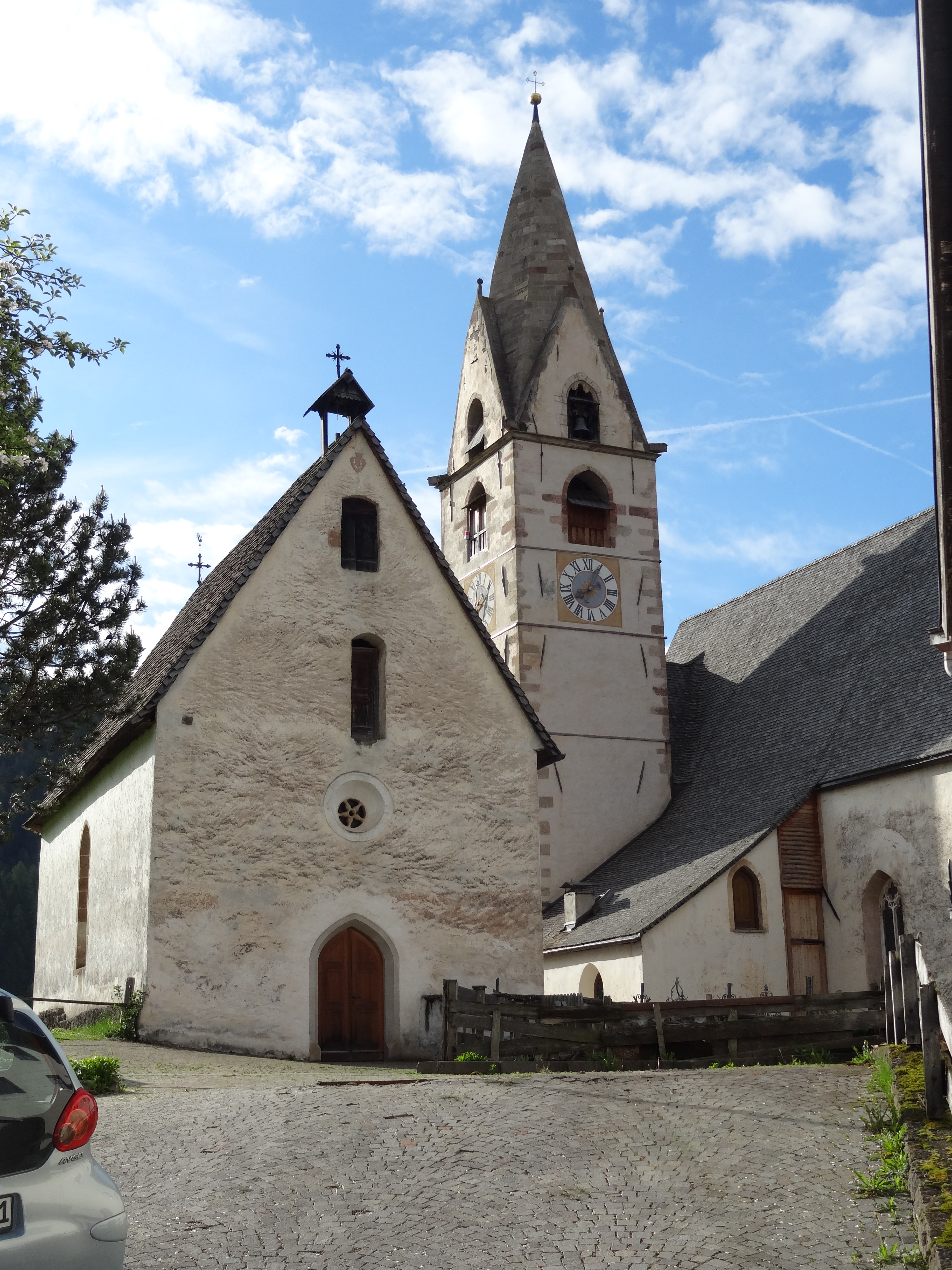 Kapelle St. Anna im Friedhof (im Vordergrund) und Pfarrkirche Maria Himmelfahrt (im Hintergrund) in Mölten, Südtirol